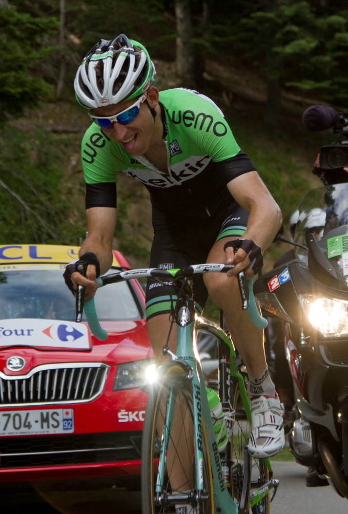 113 bauke mollema